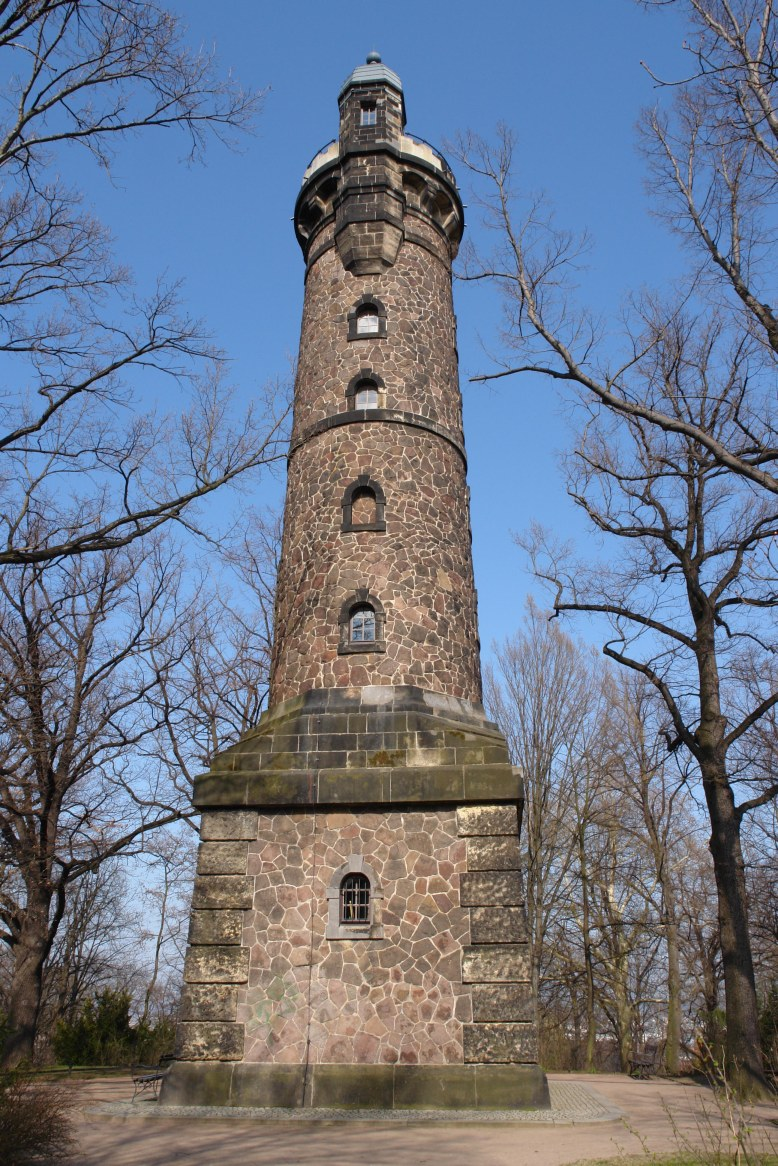 Fichteturm in Dresden-Plauen (ehemals Bismarck-Turm).